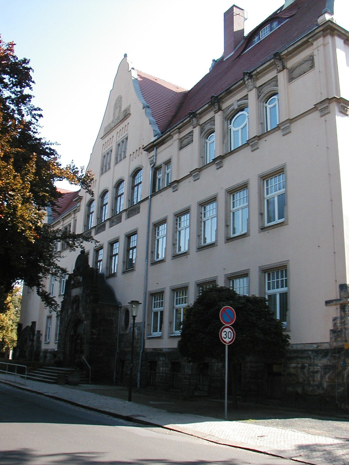 Steinbachhaus Radebeul 1